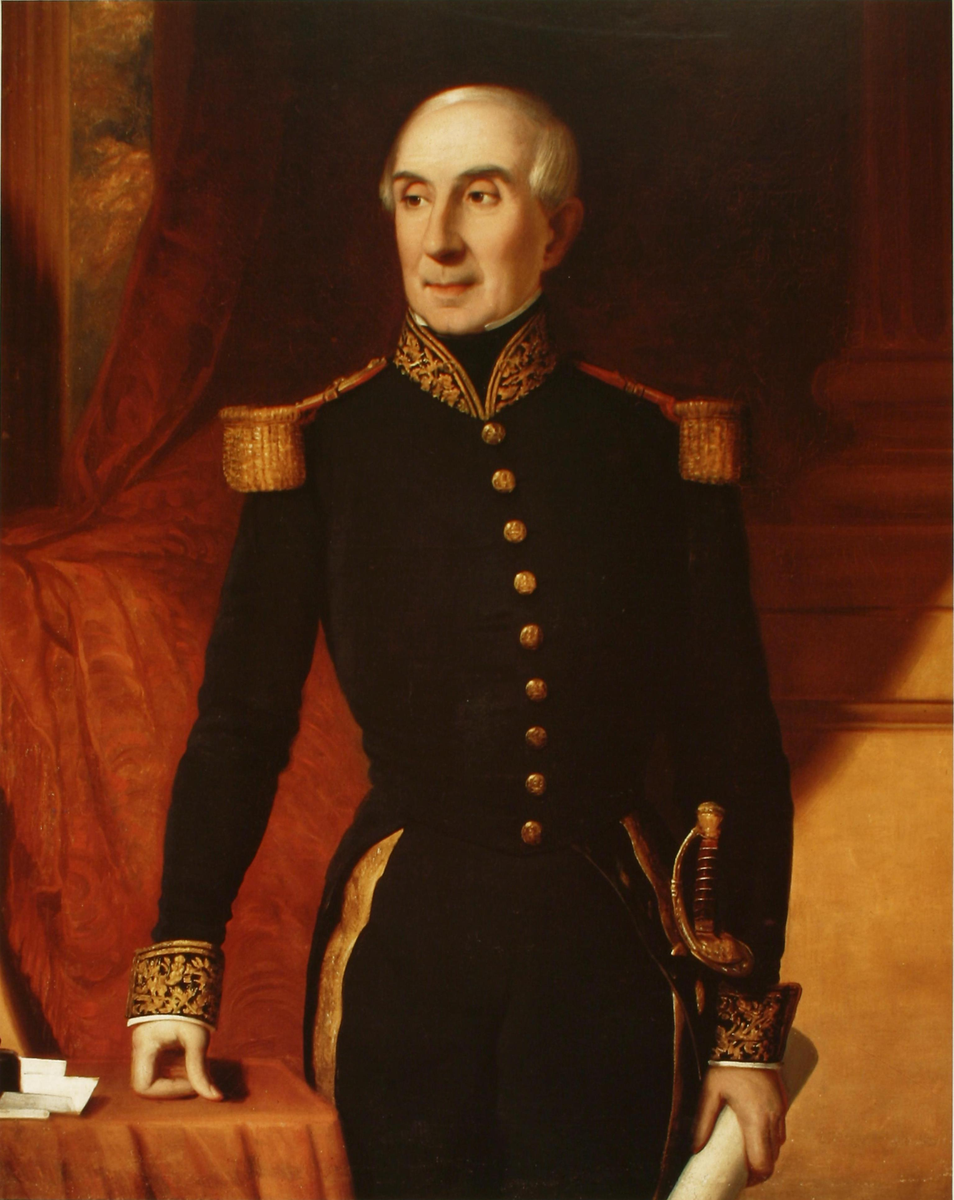 Descripción original: "(Manuel Blanco Encalada). Oleo sobre tela atribuido a Nataniel Hughes, hacia 1853. Palacio de la Moneda, Santiago." Additional info from National Library of Chile's description: Título: Manuel Blanco Encalada [estampa] . Autor: Museo Histórico Nacional (Chile) Materias: BLANCO ENCALADA, MANUEL, 1790-1876 -- AFICHES ; PRESIDENTES -- CHILE AFICHES ; AFICHES CHILENOS Lugar y editor: Santiago : Museo Histórico Nacional Fecha de publicación: 199? Descripción física: 1 cartel (afiche) : color ; 37 x 54 cm.. Idioma: Español